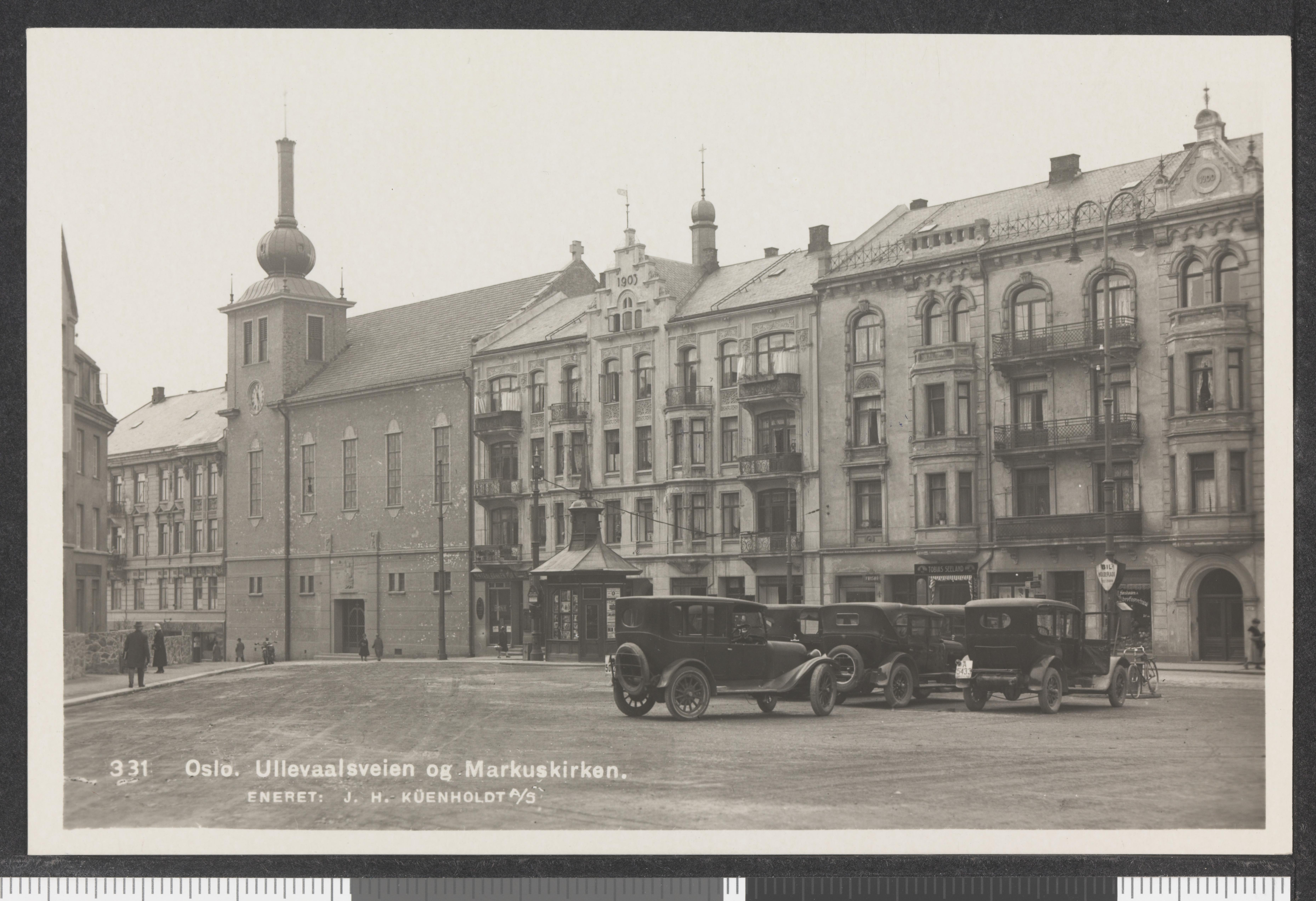 Bildet er hentet fra Nasjonalbibliotekets bildesamling Markus kirke,St. Hanshaugen,Ullevålsveien, Oslo, Oslo